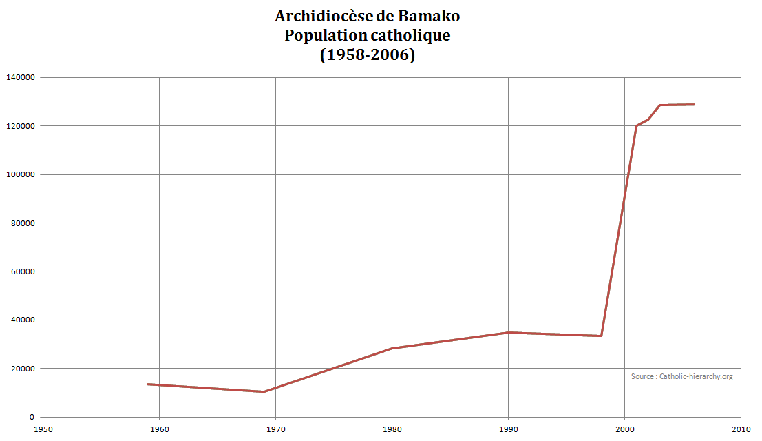 Nombre de catholiques du Mali de 1958 à 2006 Source : catholic-hierarchy